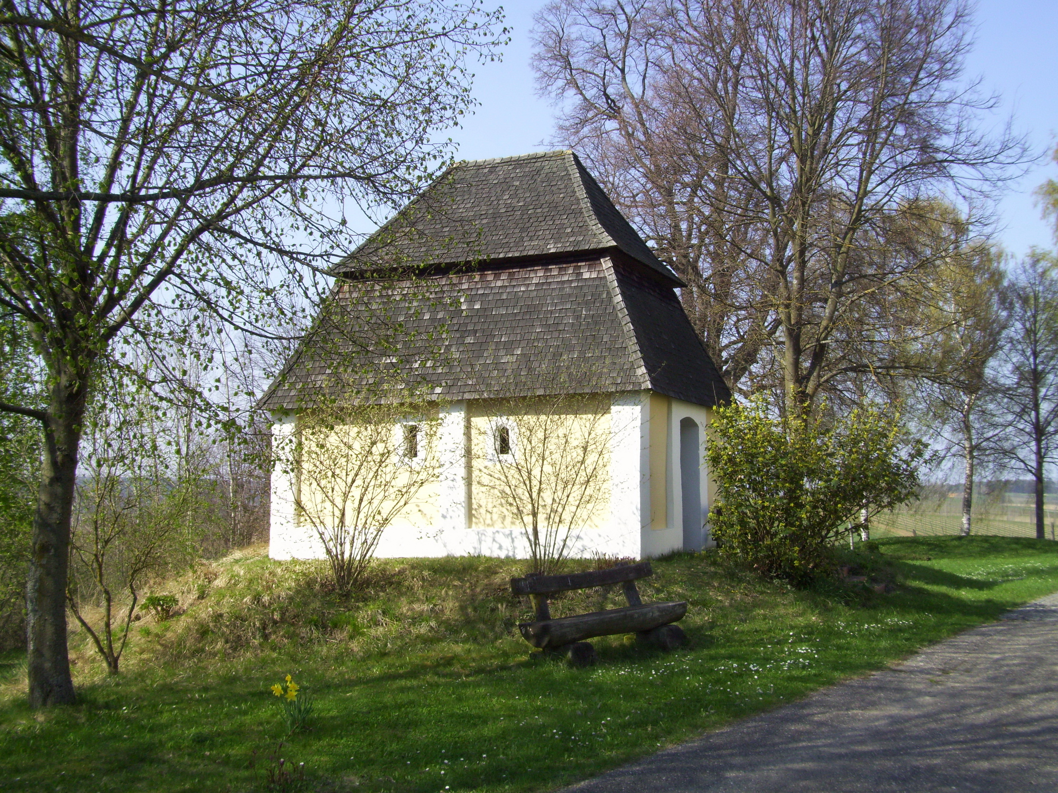 St. Anton, Feldkapelle mit geschindeltem Mansarddach, 18. Jh